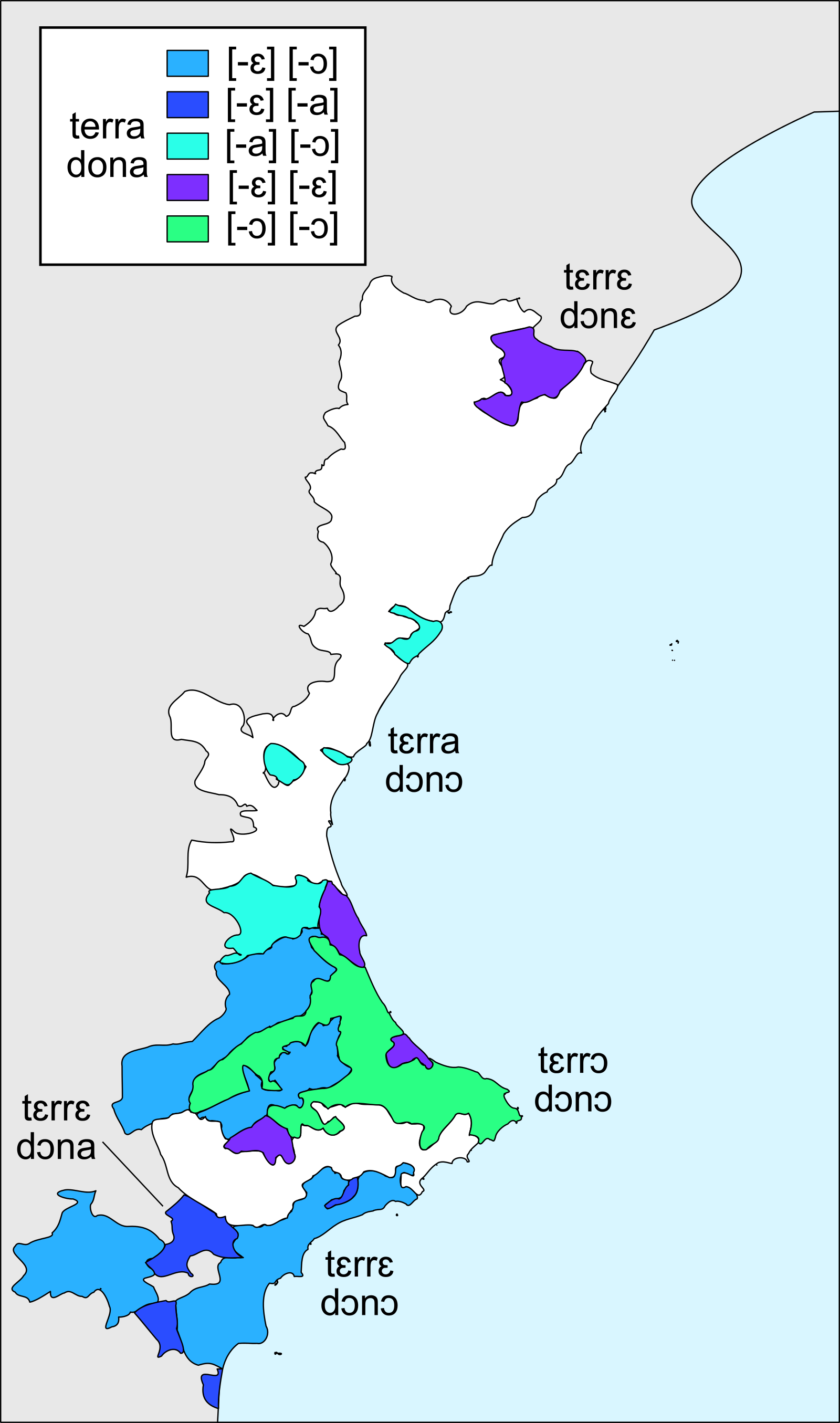 Tipos de armonía vocálica en valenciano.